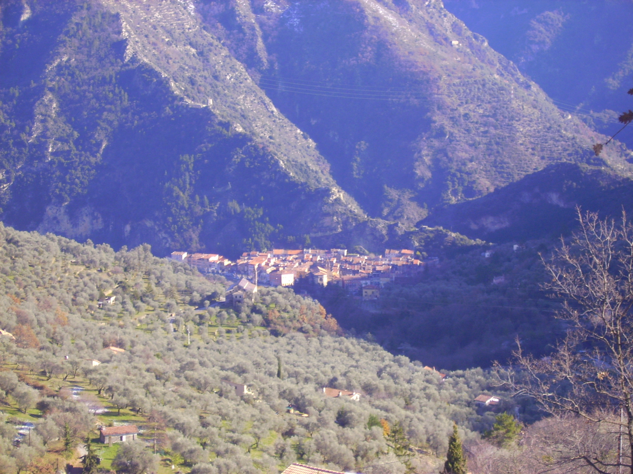 Breil sur Roya de la route de Sospel